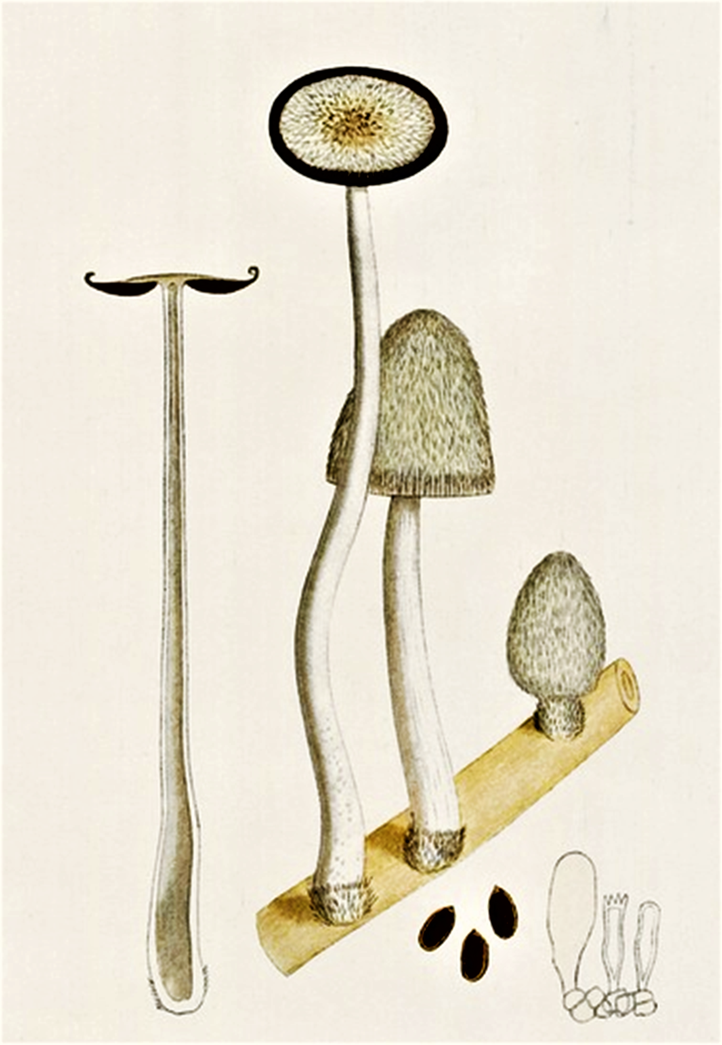 Giacomo Bresadola: Coprinus lagopus (Fr., 1821) Fr. (1838), heute Coprinopsis lagopus (Fr.) Redhead, Vilgalys & Moncalvo (2001)